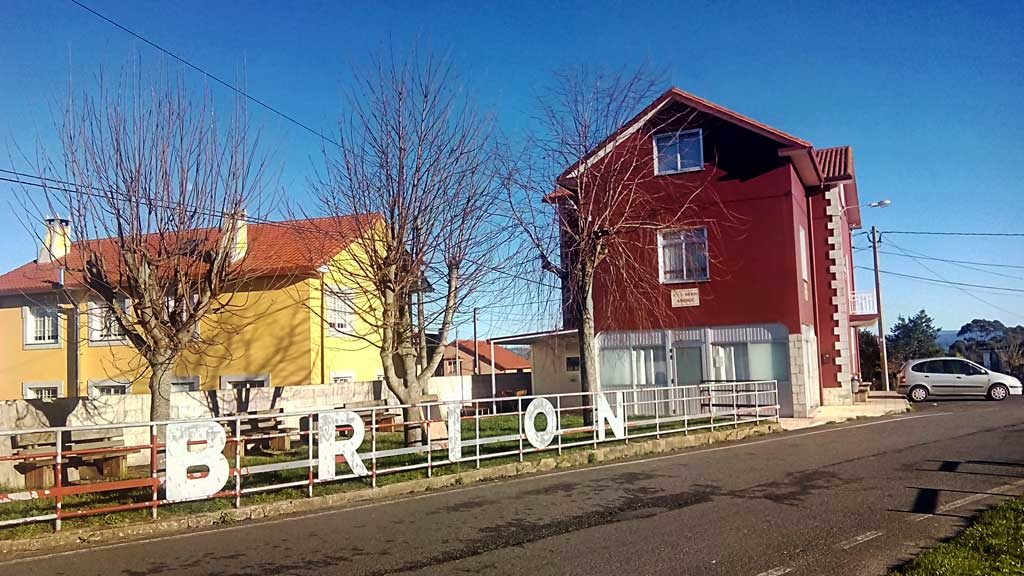 Vista do local social de Brión AVV, Ferrol.